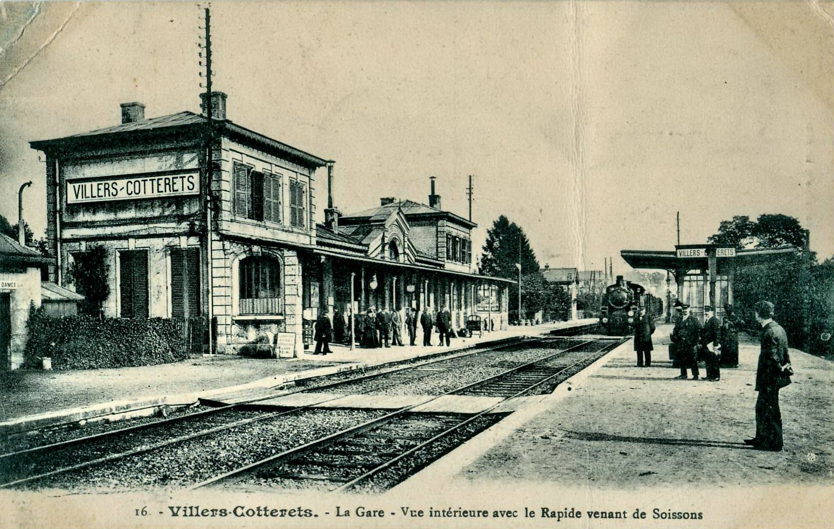 Carte postale ancienne éditée par Risse Villers-Cotterêts : la Gare